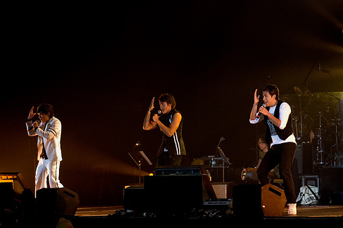 Sunboy'z Sunboyz Cantopop